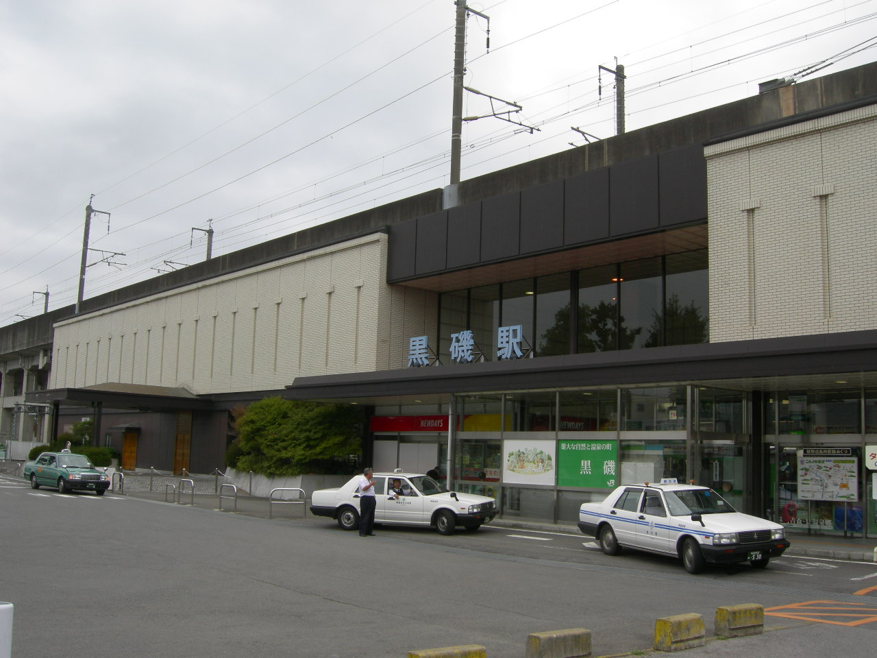 JR東北本線（宇都宮線）黒磯駅駅舎（JR Tohoku line(Utsunomiya line) Kuroiso station）